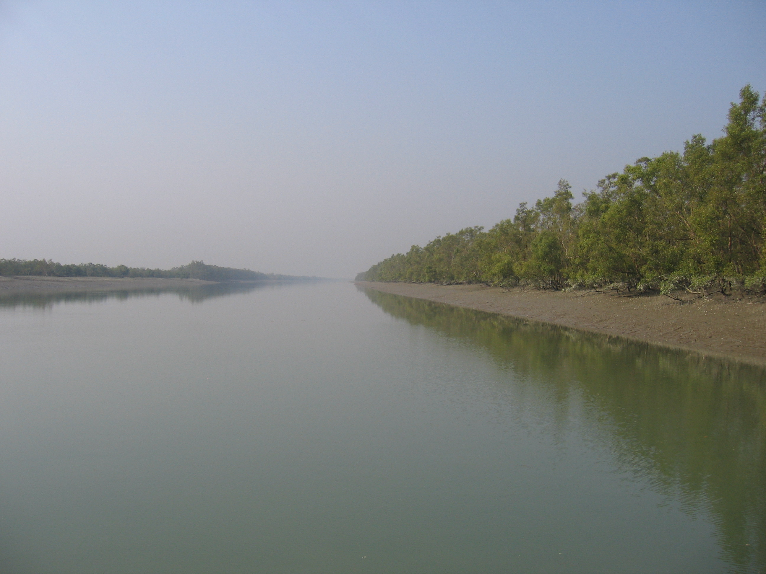 Sunderbans National Park